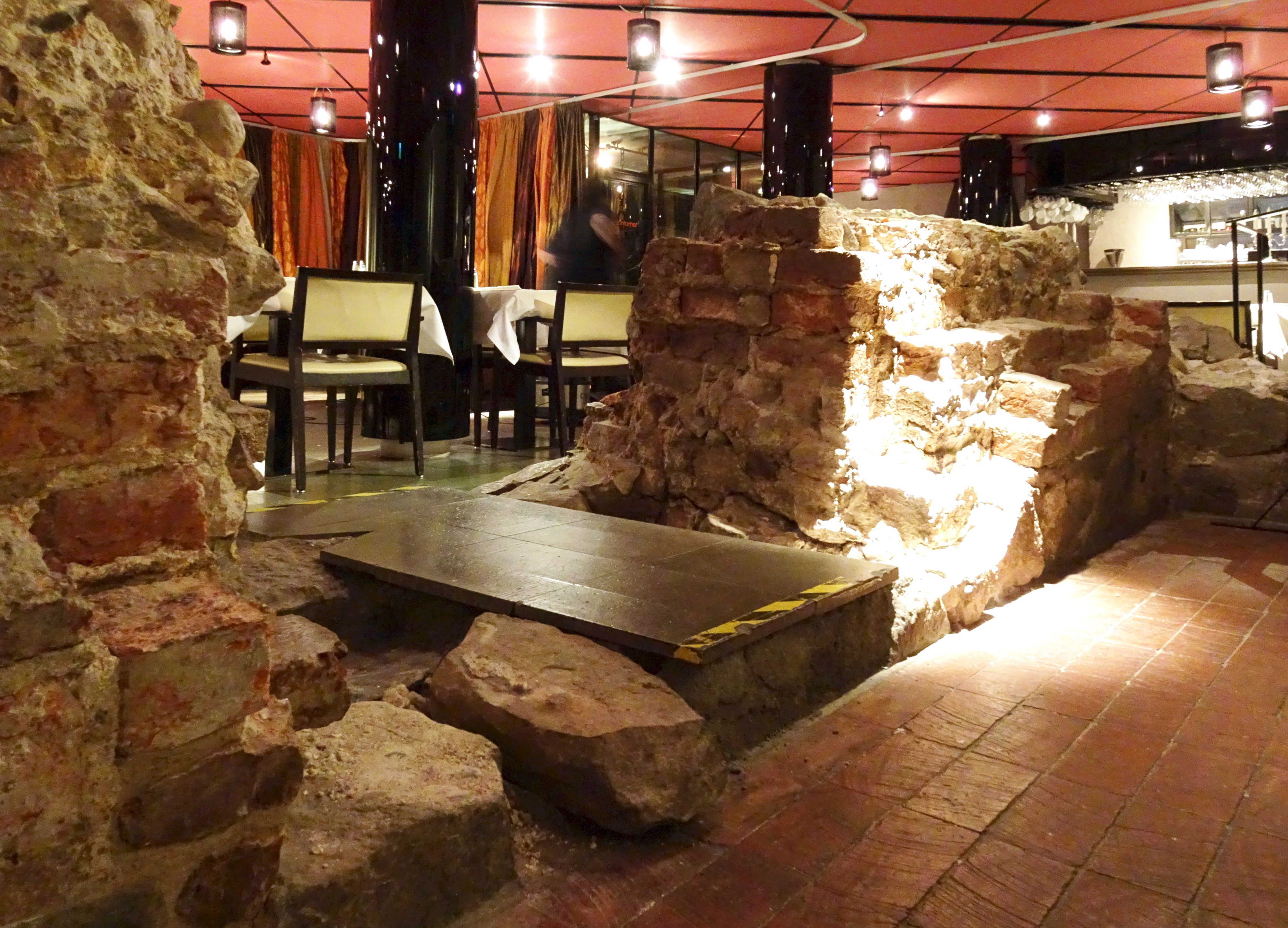 Lejontornet i Victory Hotels matsal, Lilla Nygatan 5